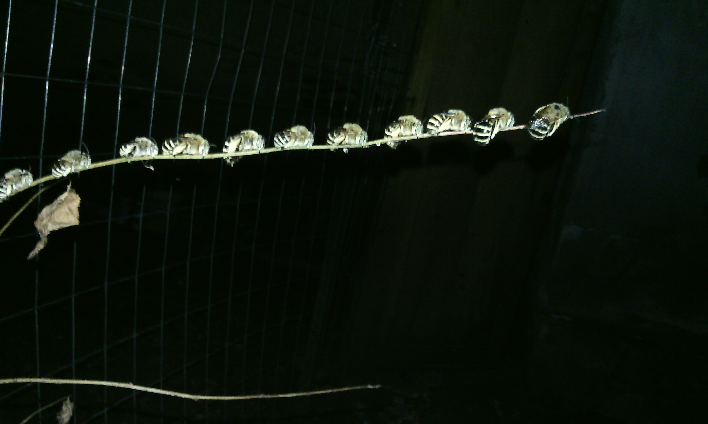 Albine solitare dormind noaptea pe o crenguta uscata